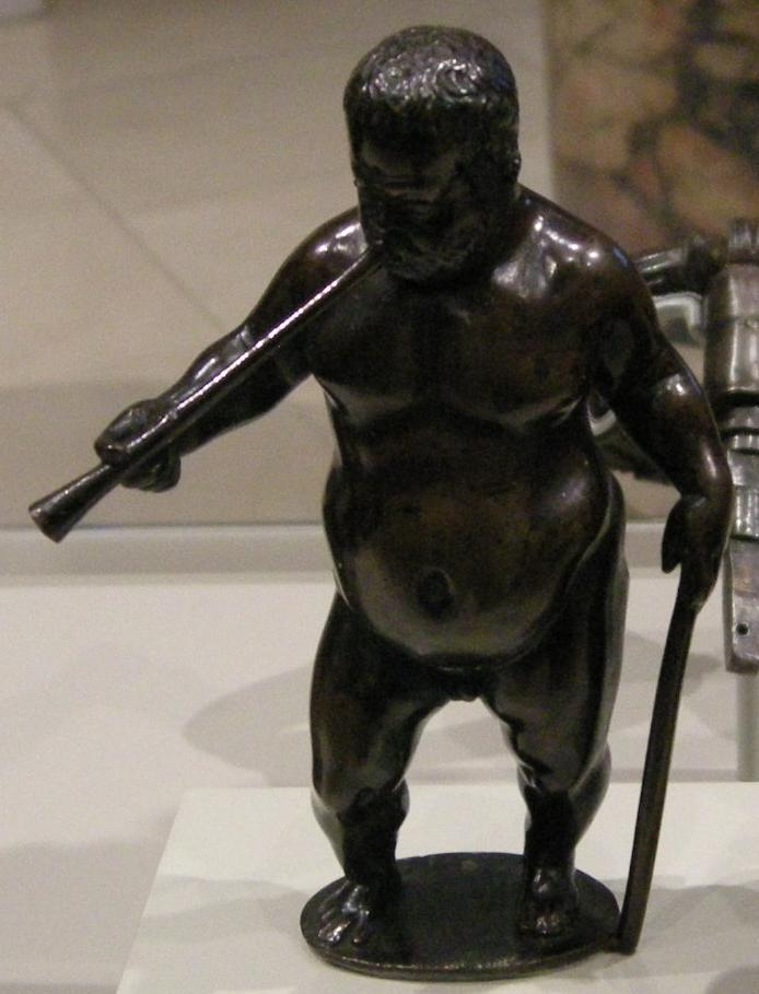 Antonio susini (attr.), da un modello di giambologna, nano morgante che suona la trombetta, 1580-90 ca.